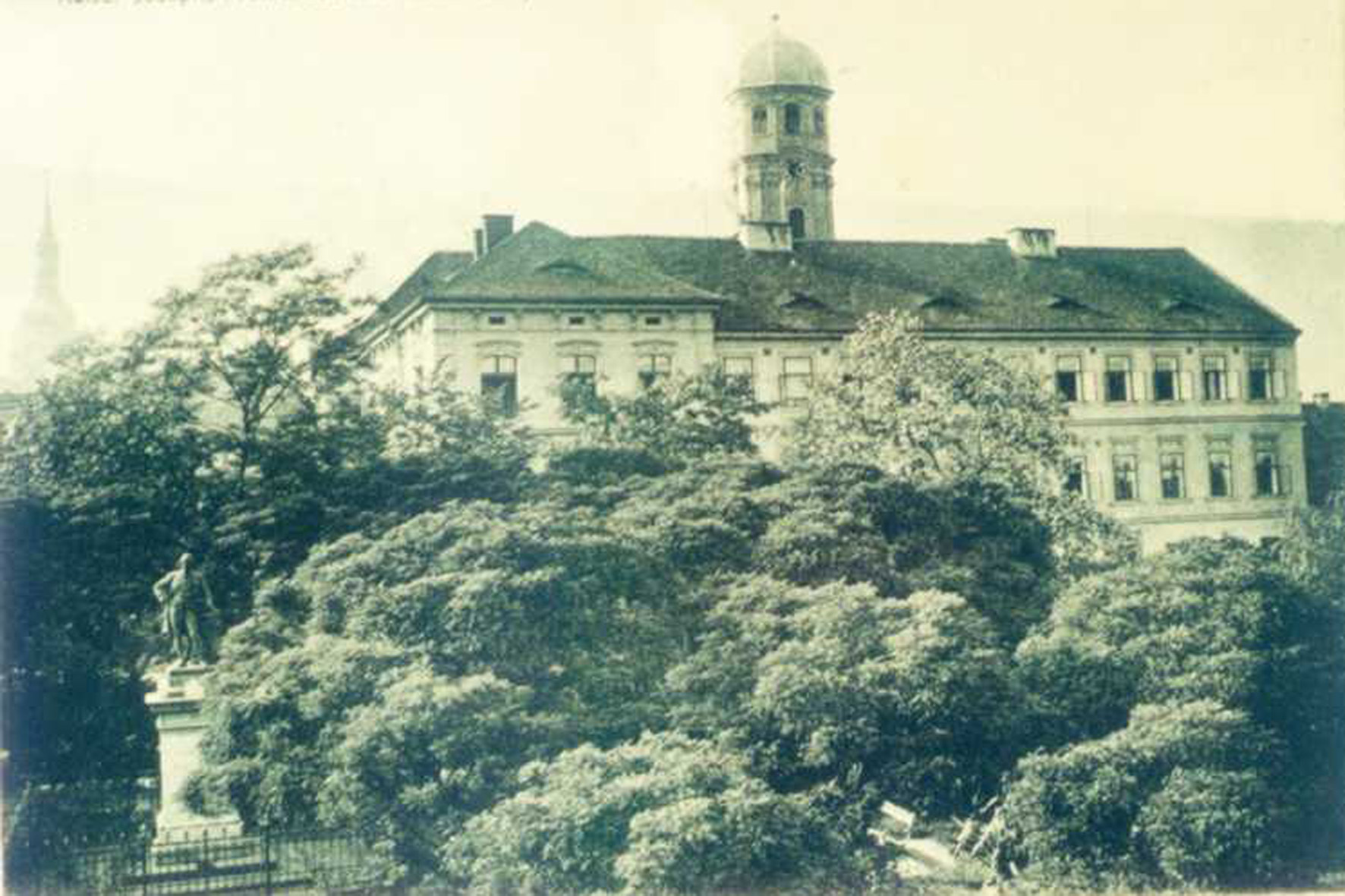 Piaristické gymnázium v Mostě